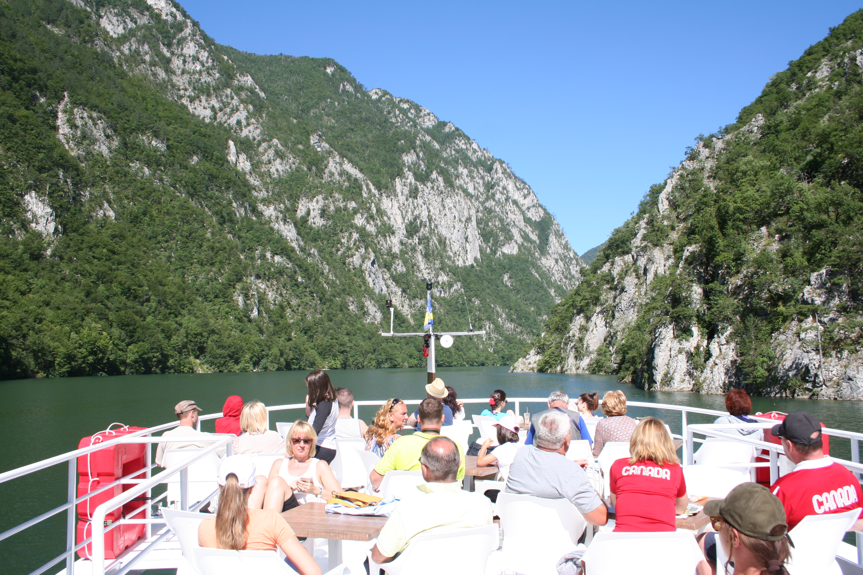 Krstarenje Drinom brodom Grizzly 2, Perućac-Višegrad